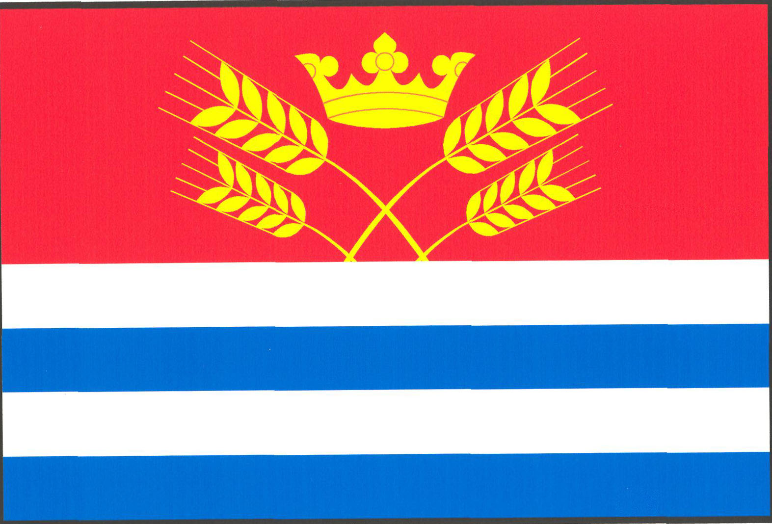 Vlajka obce Vejvanovice